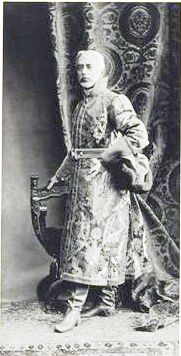 Prince and Steward of the Household Georgy Dmitriyevich Shervashidze in a fancy dress of a 17-century boyarin/Гофмейстер Князь Георгий Дмитриевич Шервашидзе (в праздничном кафтане боярина 17 века).